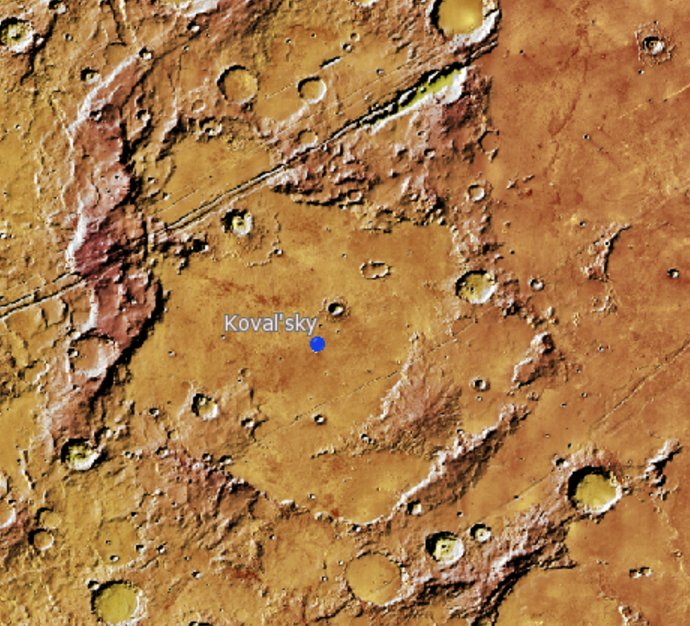 Cráter marciano Koval'sky. (Imagen IAU/USGS/Goddard/A SU/USGS)